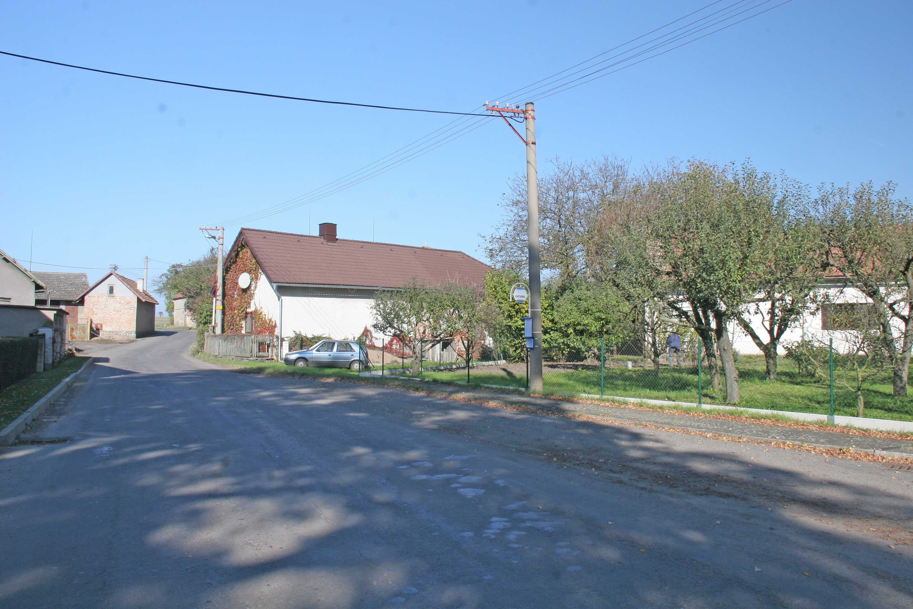 Tuchov zastávka